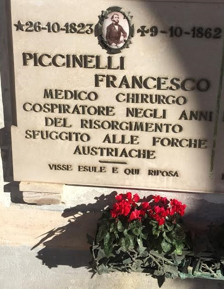 La tomba del dr. Piccinelli Francesco, medico chirurgo e cospiratore risorgimentale brinziese, nel cimitero del paese natale